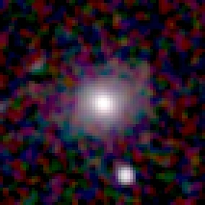 Galaxy NGC 5